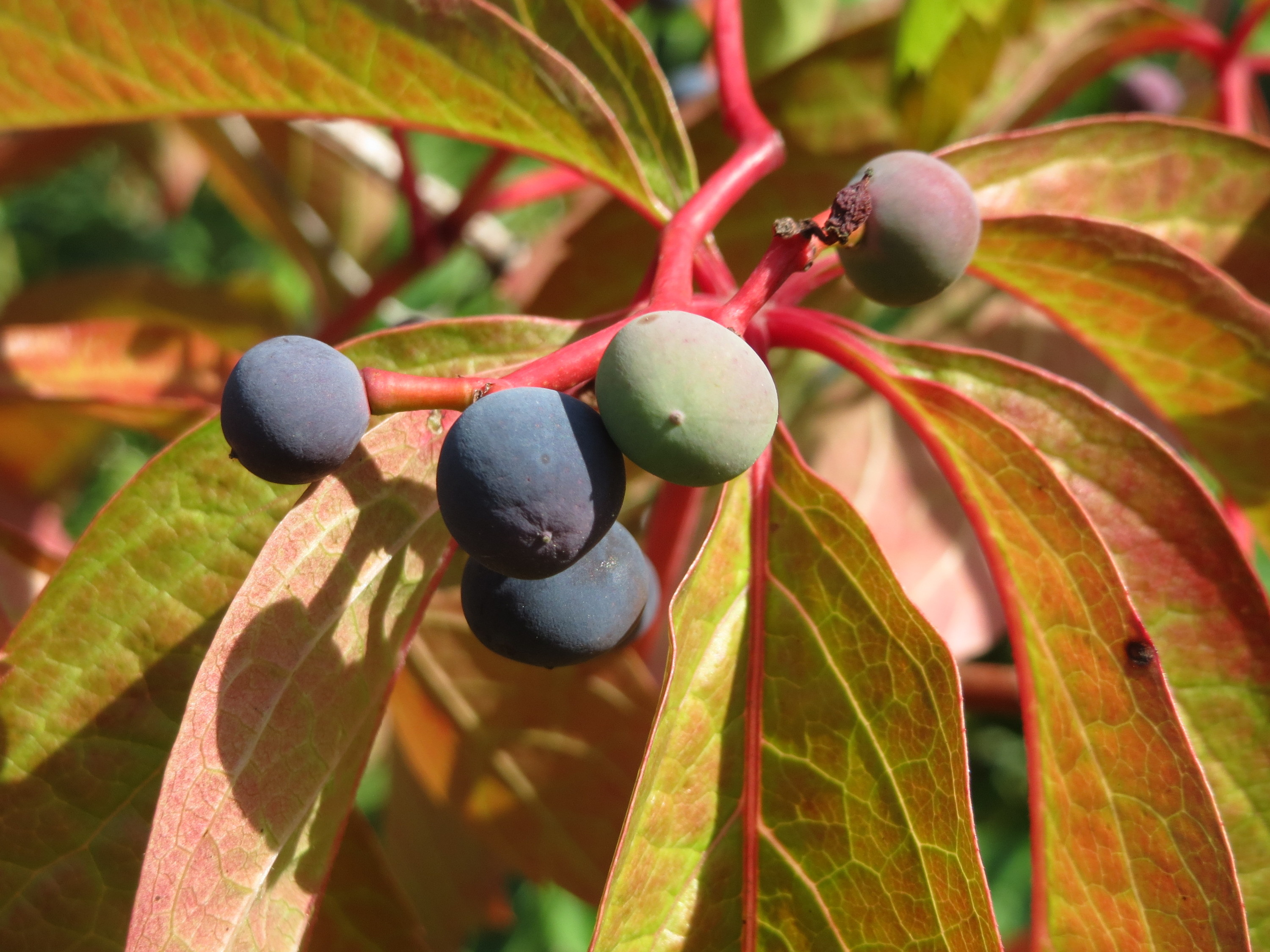 Selbstkletternde Jungfernrebe (Parthenocissus quinquefolia) im Schwetzinger Hardt